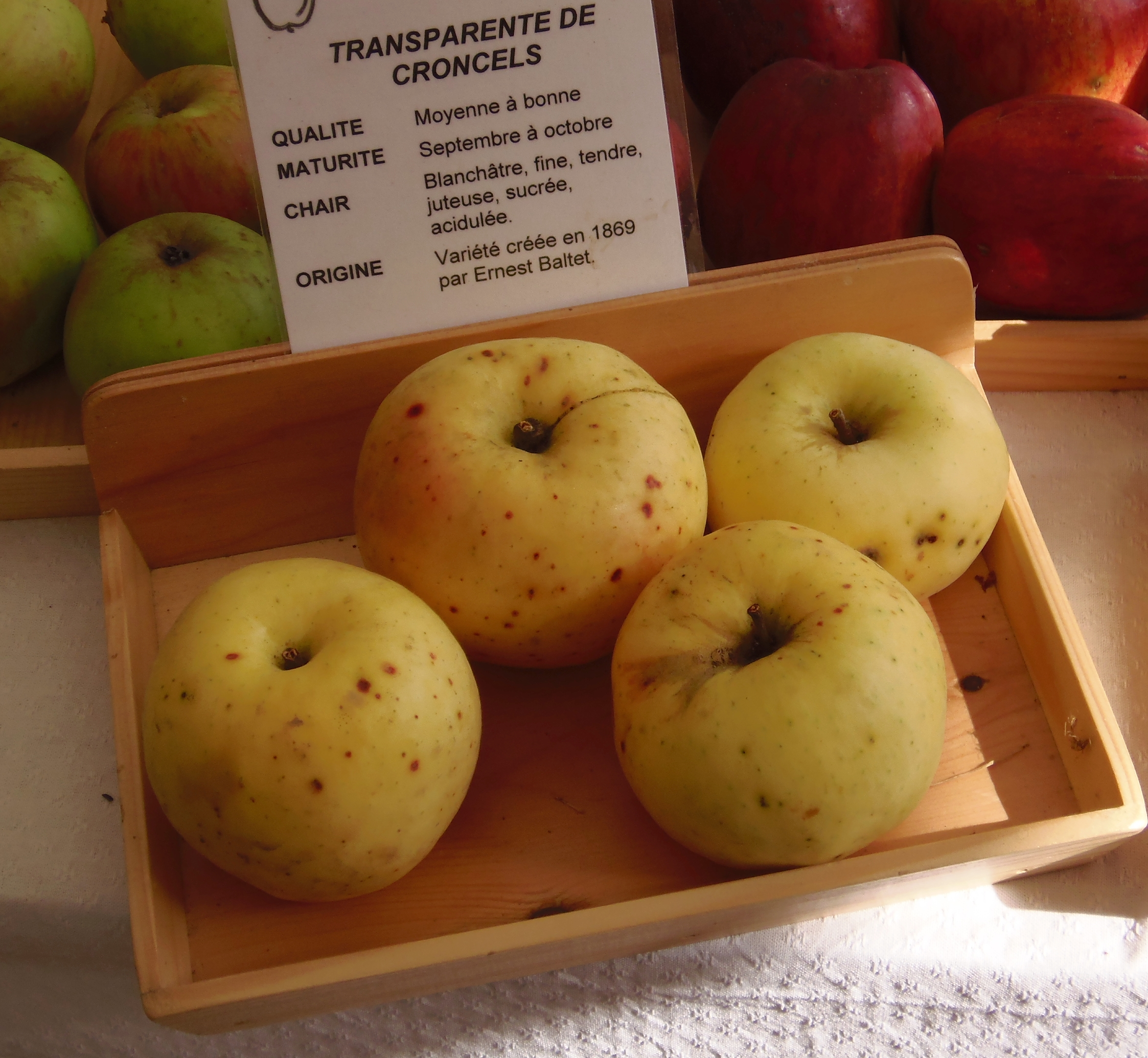 Pommes 'Transparente de Croncels' sur un étal à Bréel (Normandie, France).